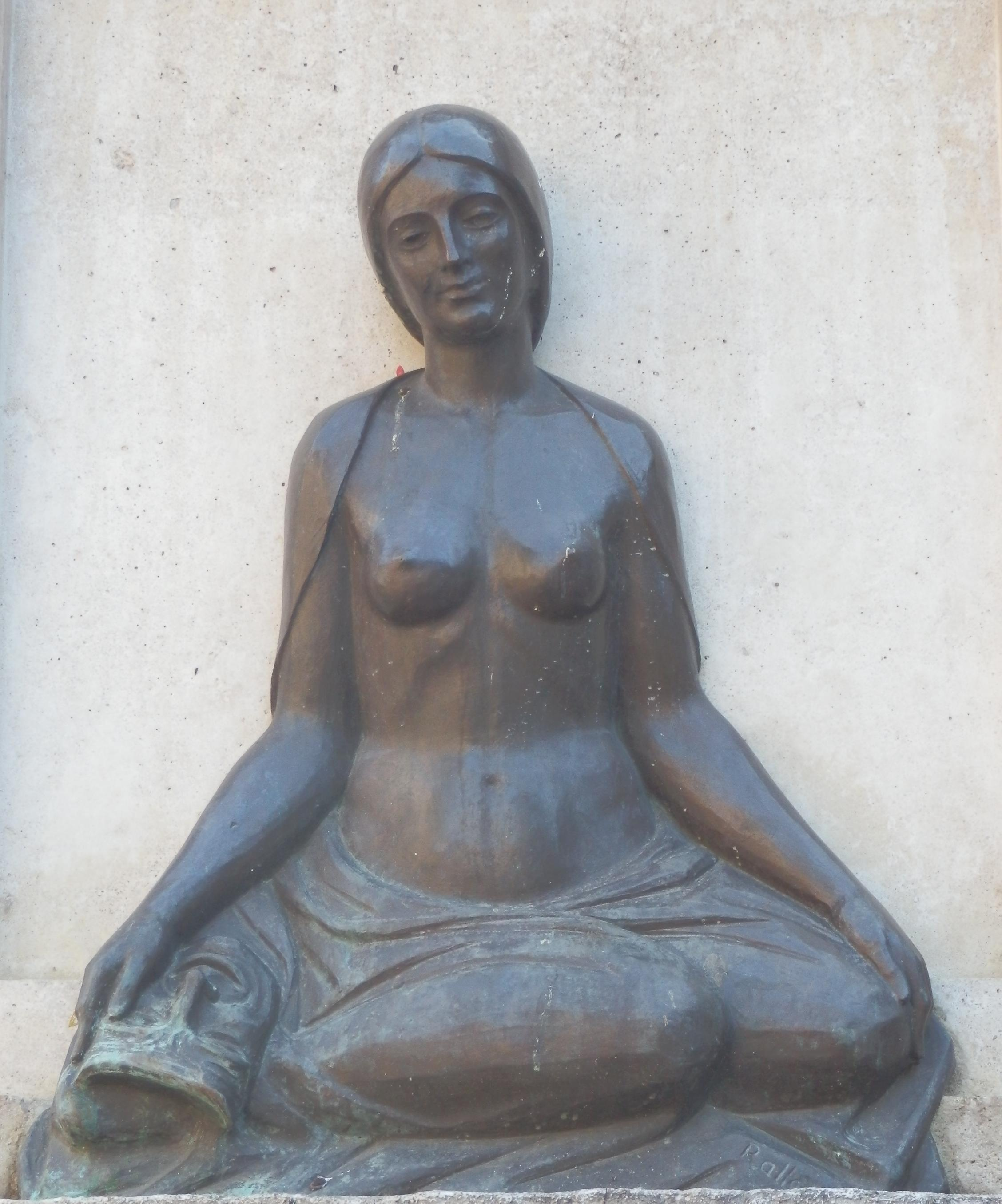 Teatro del Mercado en Zaragoza.